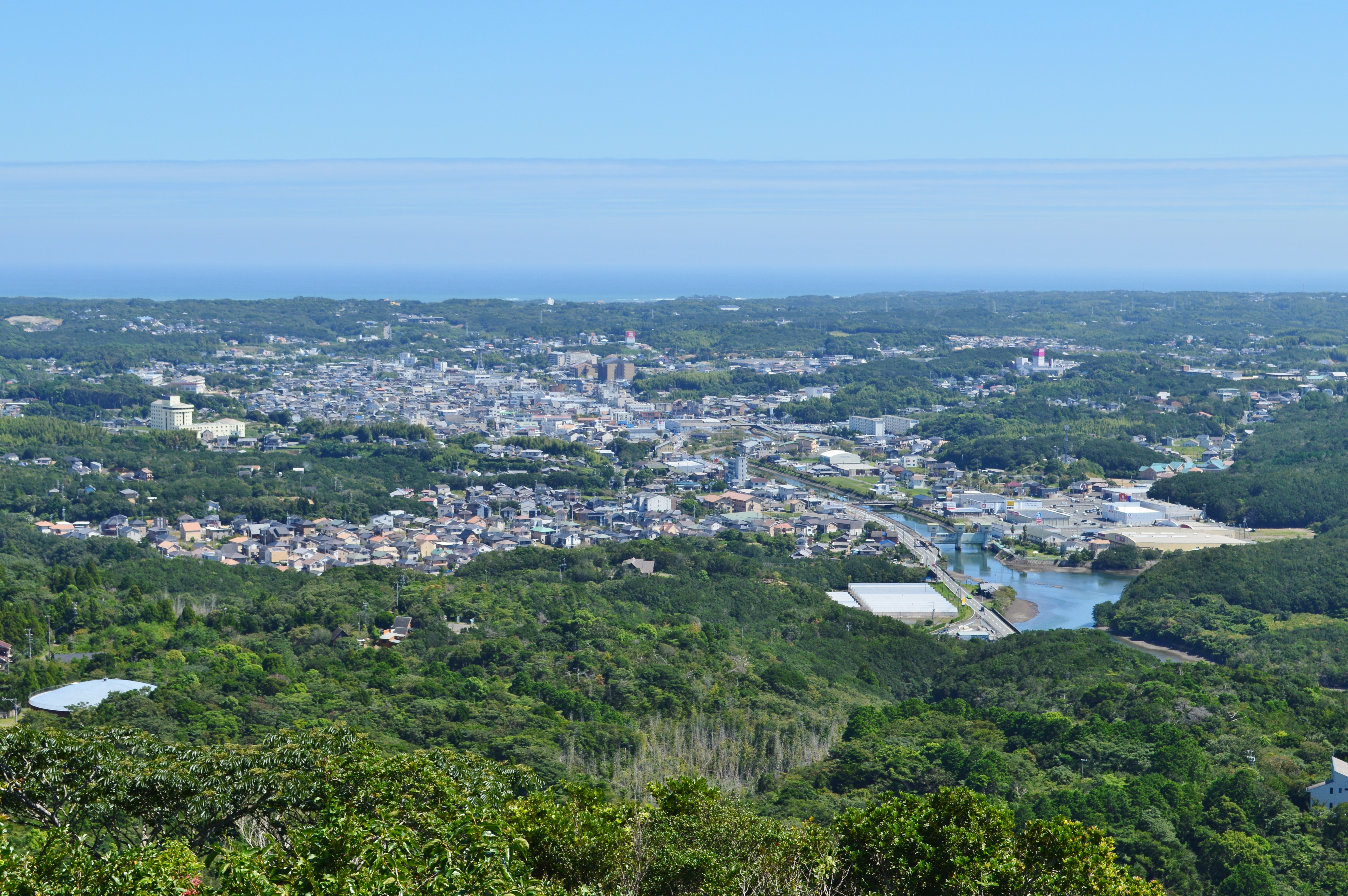 横山展望台から望む鵜方市街地